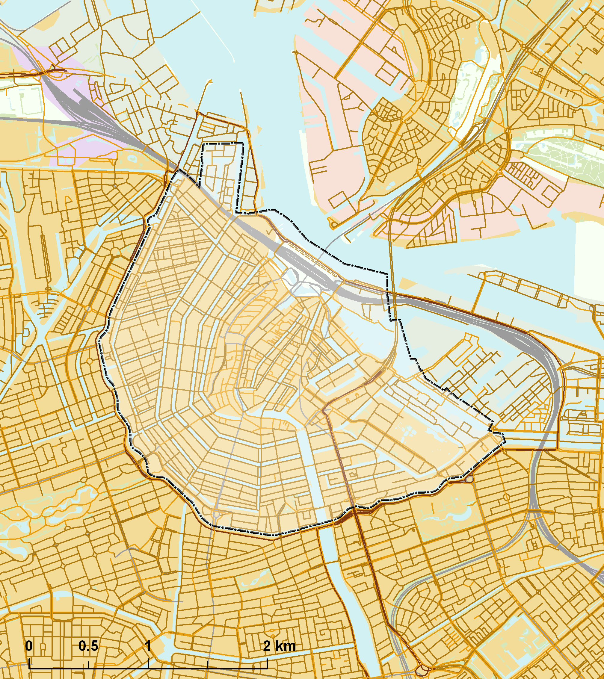 Rijksbeschermd stads- of dorpsgezicht - Amsterdam - Binnen de Singelgracht.png